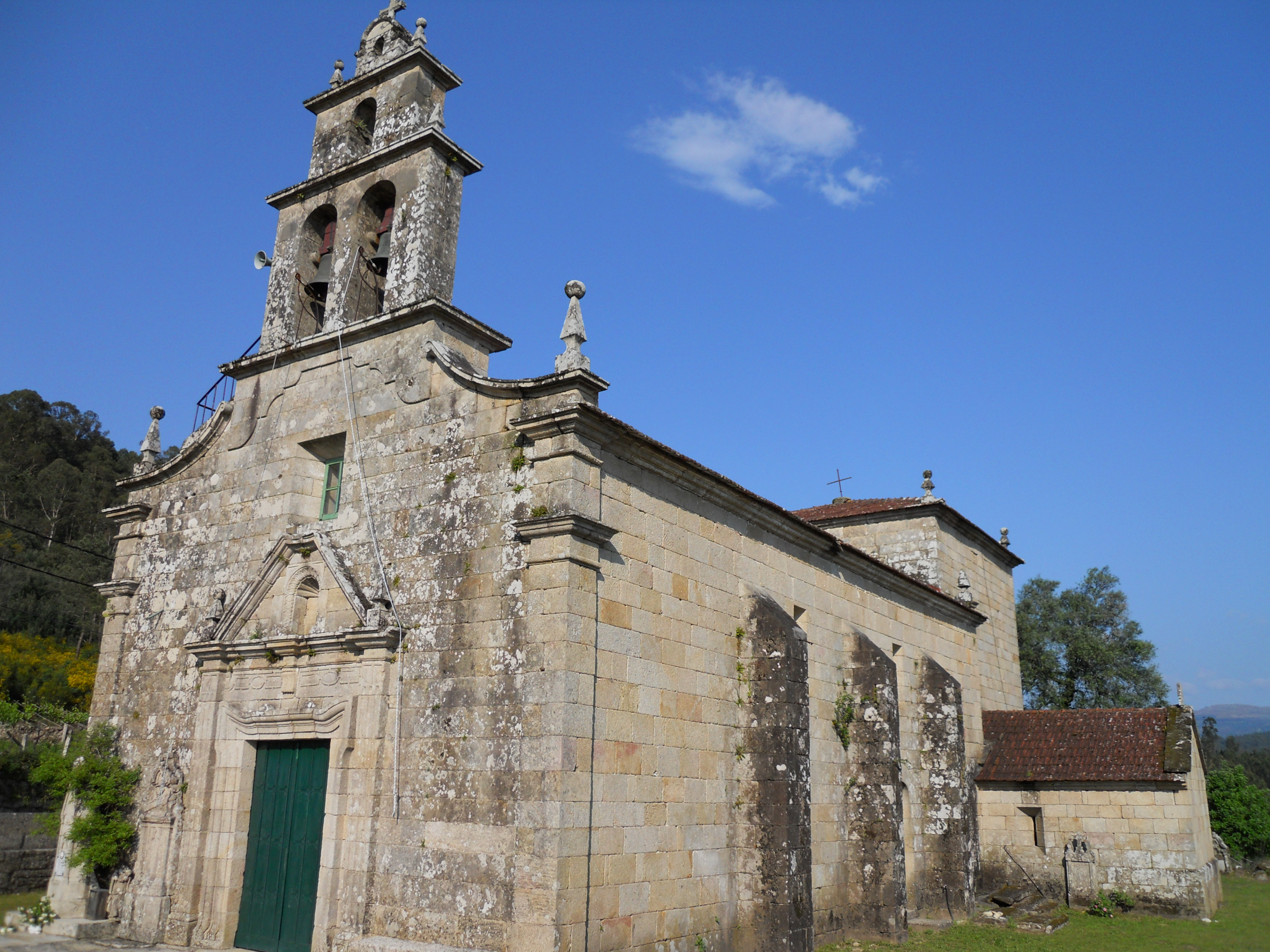 Esta foto participó en el juego En otro lugar de Flickr. Escucha a Carlos Núñez & The Chieftains - Tears of Stone en Goear.